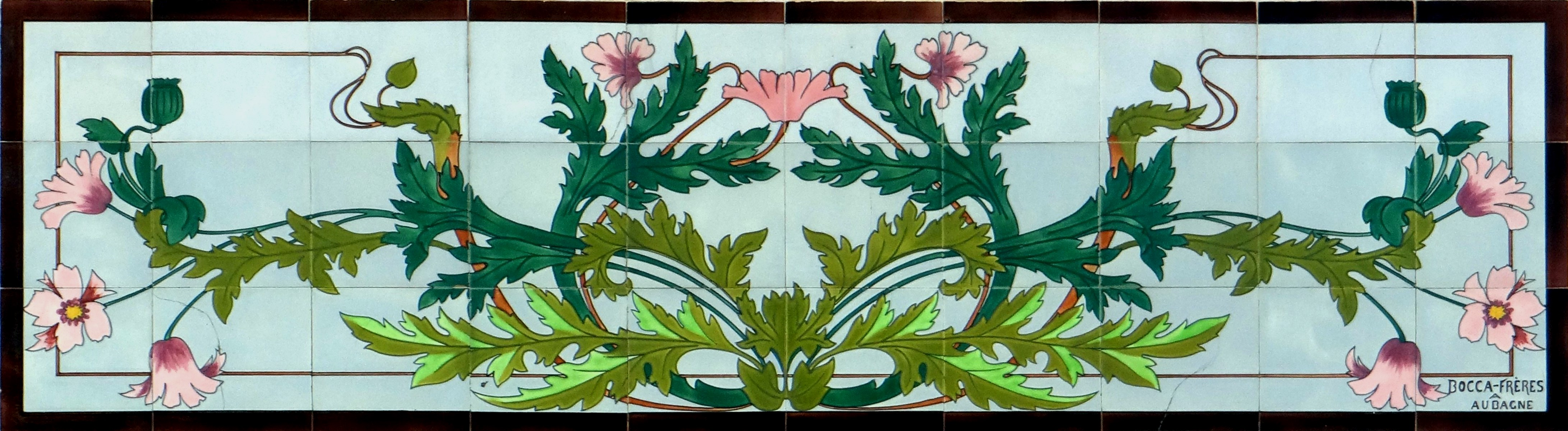 Anciennes halles, Bld Jean Jaurès, Bouches-du-Rhône, France. Décors en carreaux émaillés des frères Bocca.